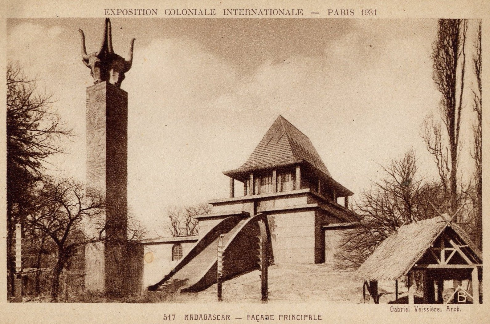 Pavillon de Madagascar à l'Exposition Coloniale de PARIS en 1931